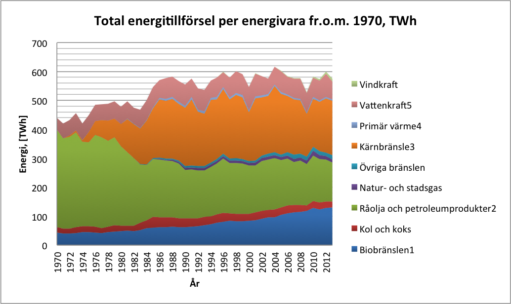 Denna bild visar den total energitillförseln i Sverige per energivara mellan åren 1970-2013 angett i TWh.